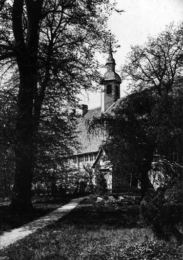 Kreuzkloster in Braunschweig um 1892